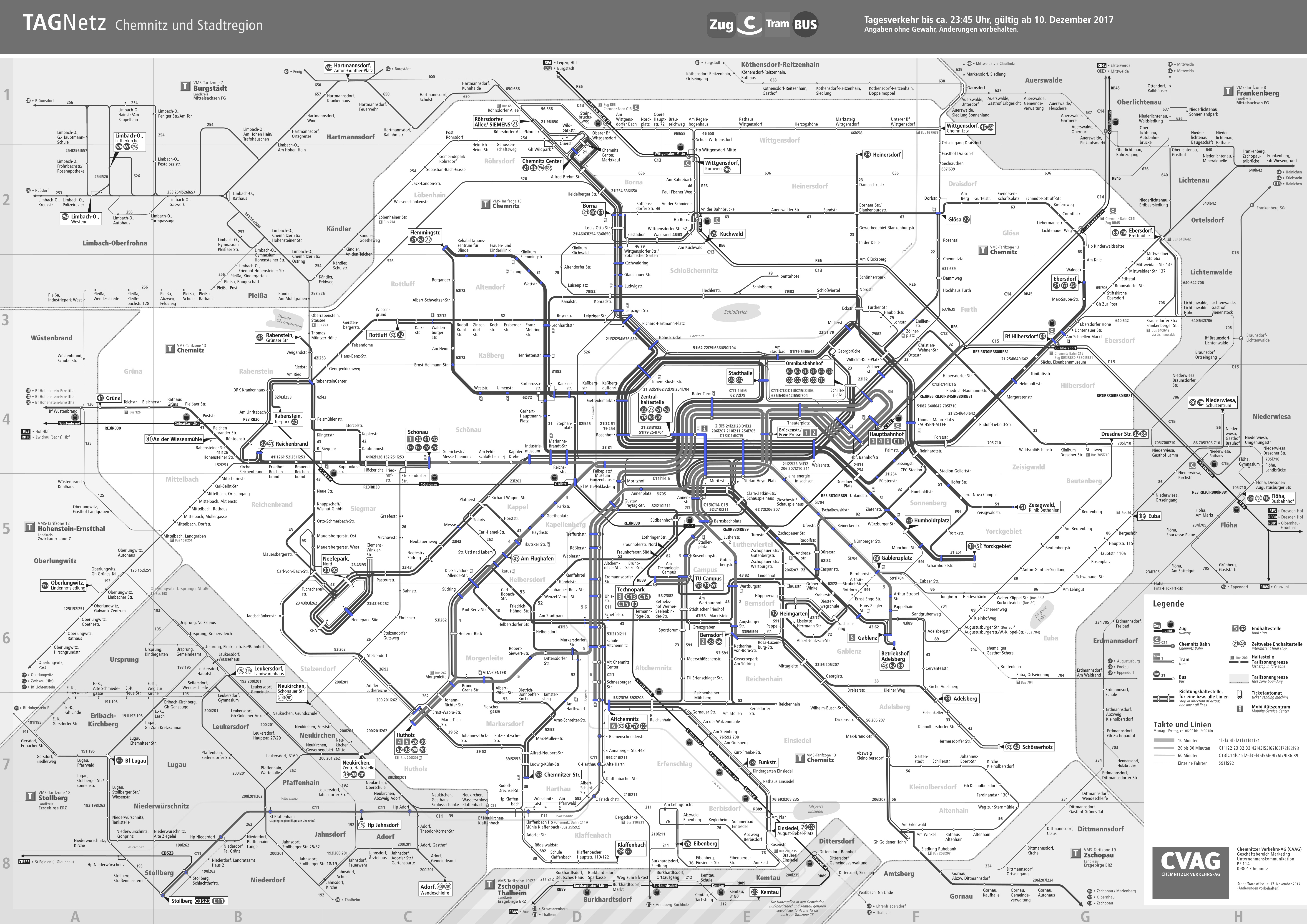 Standorte von DFI-Anzeigen der CVAG und CityBahn (Mindestens eine Anzeige pro Haltestelle) - blau: Aufbau bis 2014 - rot: Aufbau 2014 - lila: Anzeigen CityBahn Chemnitz